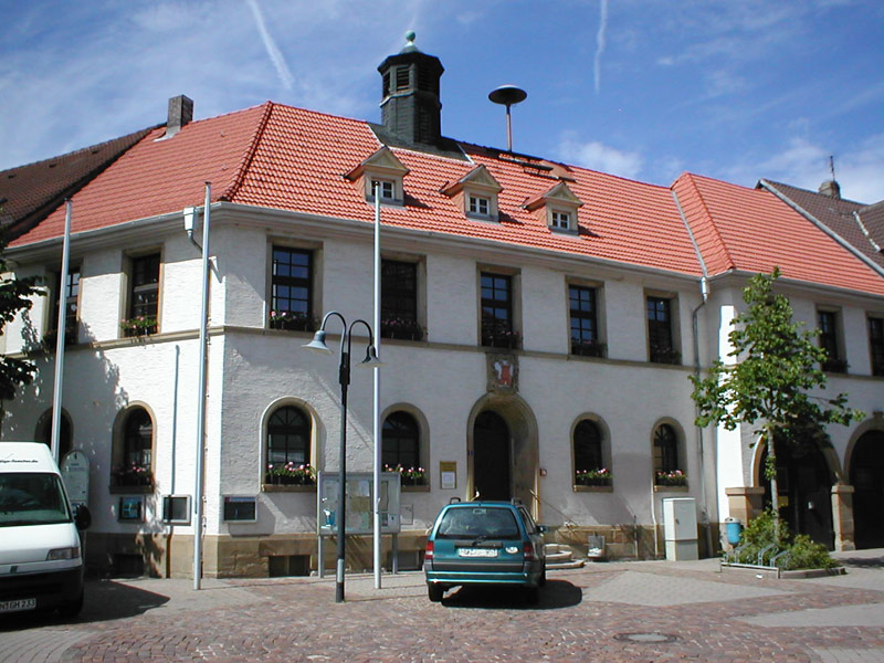 Rathaus in Sinsheim-Weiler